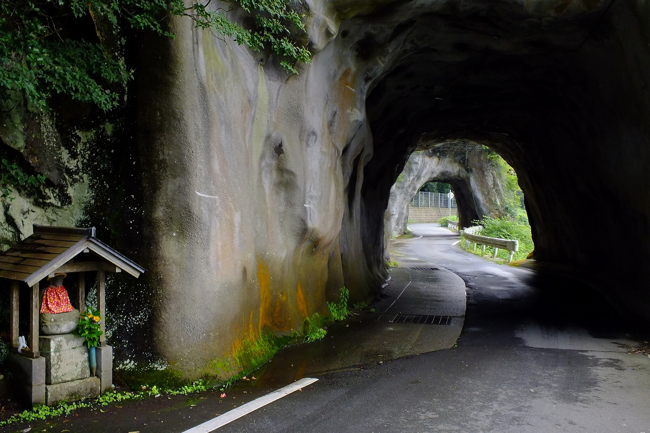 〒671-2522 兵庫県宍粟市 山崎町杉ケ瀬３１８−１ 与位の洞門